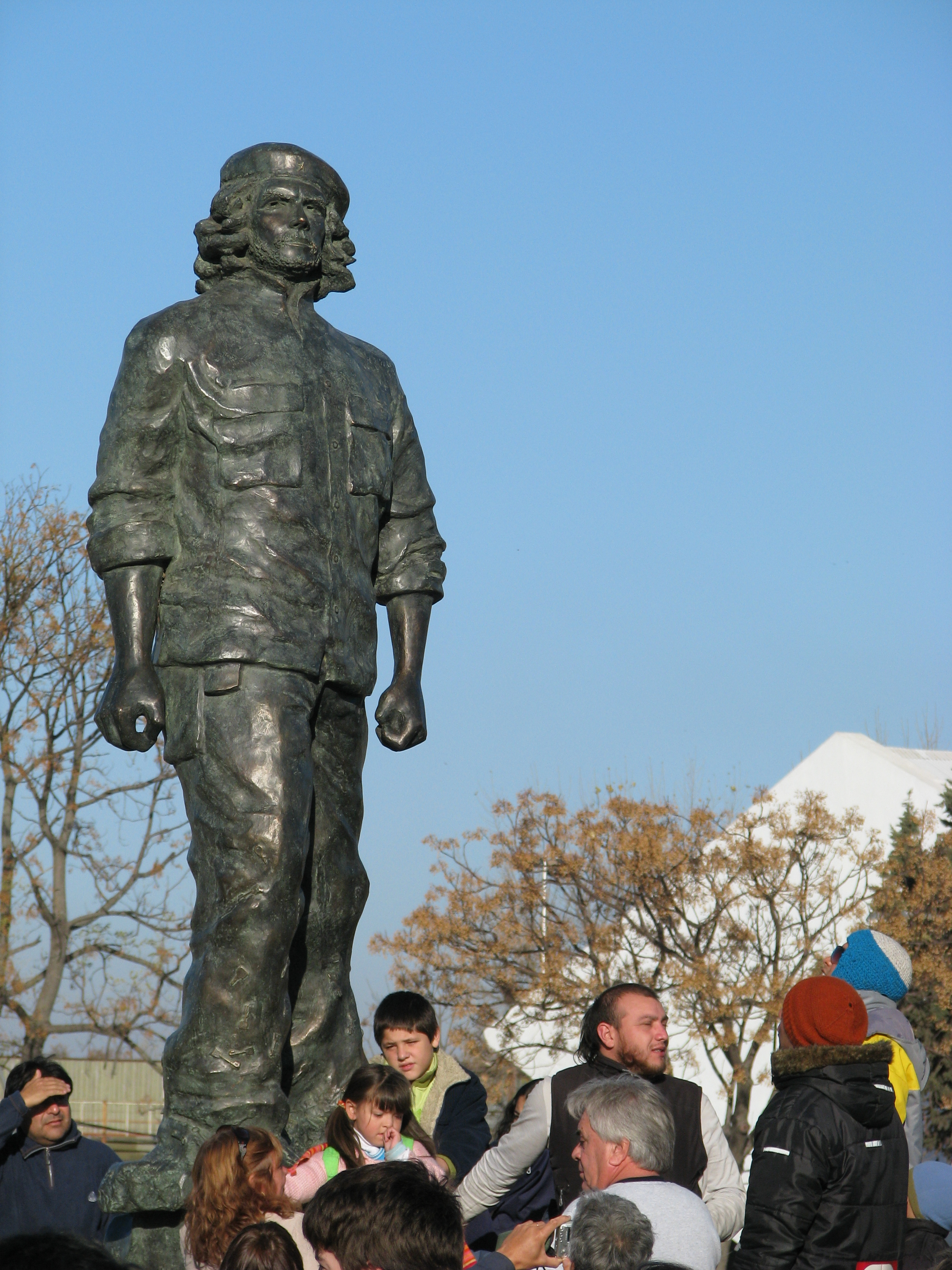 Parque Hipólito Yrigoyen, lugar donde el monumento fue emplazado e inaugurado el 14 de junio de 2008 día que se conmemoró el 80º aniversario de su nacimiento.